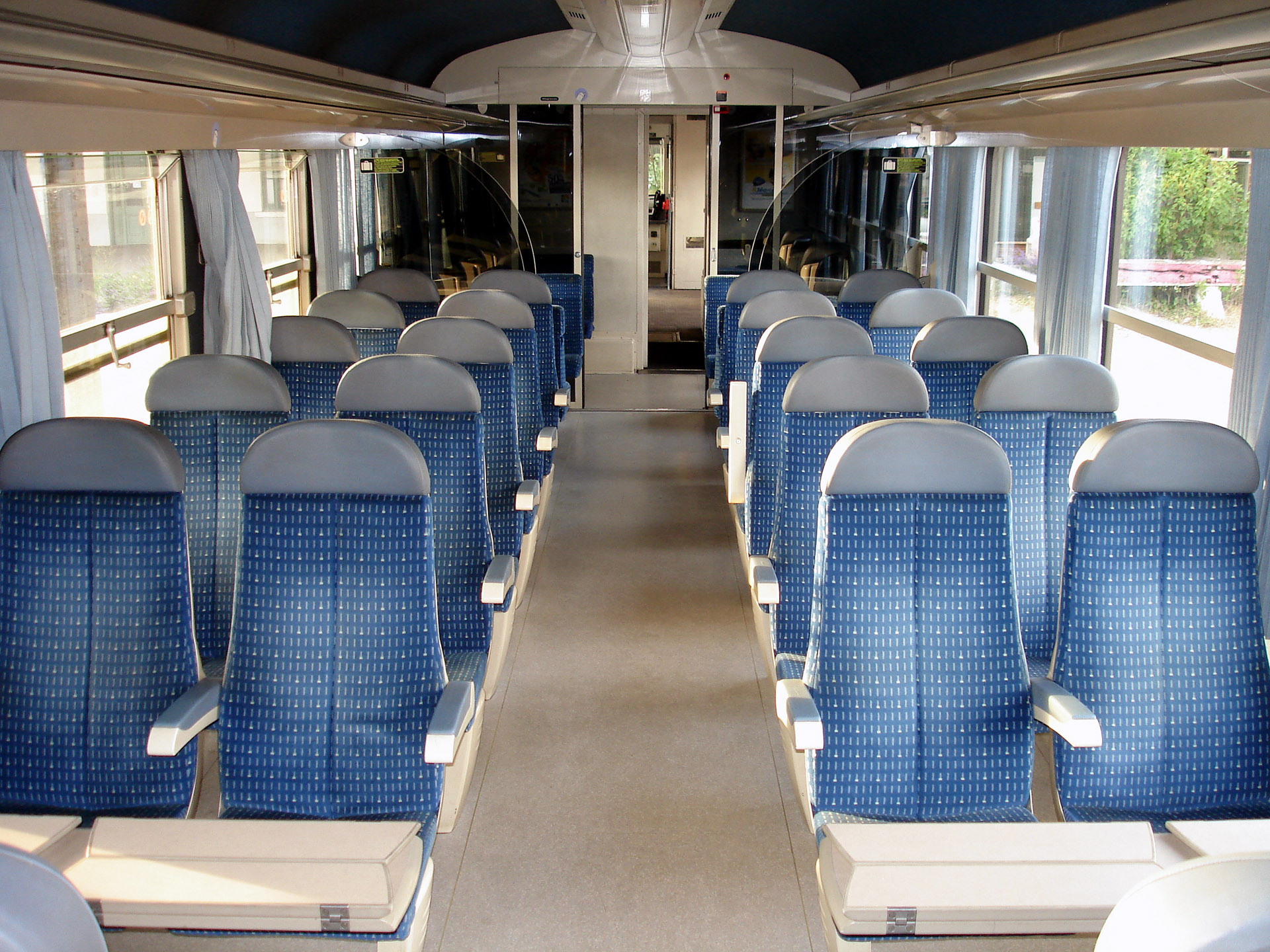 Espace voyageurs d'un X 4900 stationné en gare de Dieppe, Seine-Maritime, France.